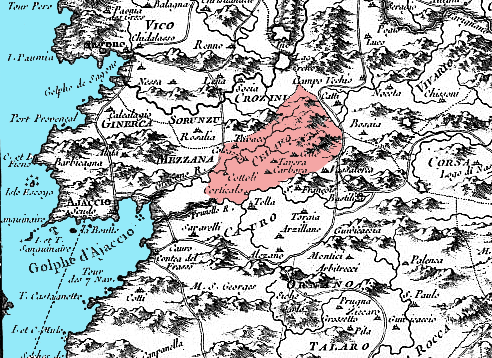 Extrait de la carte de Bellin concernant la pieve du Celavo et ses voisines, en 1764